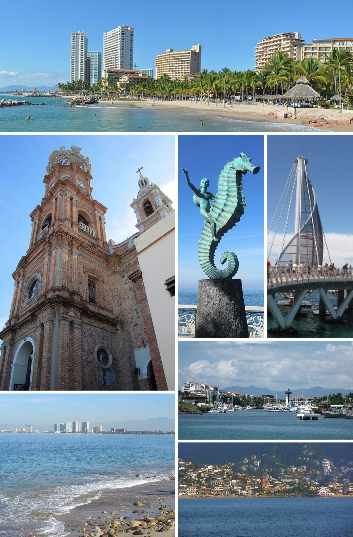 Puerto Vallarta